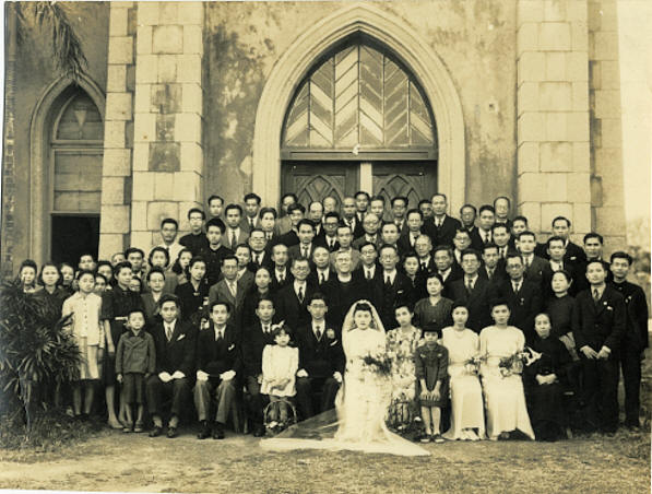 中文（台灣）: 劉忠堅牧師（Rev. Duncan MacLeod）證婚，楊基銓、劉秀華夫婦擔任介紹人。 前排坐者左起：施炳瑯、張國雄、鄭君芳牧師、賴永祥、劉慶理、汪紫蘭(鄭君芳牧師娘)、顏碧仙、?、劉王環治； 第2排中央為劉忠堅牧師(Rev, Duncan MacLeod)，其左依順是盧明(背後是朱華陽)、賴葉、賴德載，其右依順是劉青雲(背後是邱炳南)、劉貞、劉子祥(背後是王育霖)、林茂生夫婦、吳春霖、劉革新。 第3排中央(新娘正背後)為楊基銓(其背後是小山捨男)，其右依順3是楊劉秀華、郭馬西牧師；其左依順是葉金木牧師、山中樵、徐炳南。 第3排最右黃六點牧師，其左是張崑遠牧師，其左是徐先堯。 第4排最右為石錫純，其左是朱昭陽，其左是王育霖，見於兩人間在後是劉明。第4排左起第4位是朱華陽。 最後排最後面一位是楊廷謙。相片中有林茂生、王育霖二人在二二八事件時遭中國國民黨政權殺害。在白色恐怖時被槍殺的有張國雄，被捕的有朱昭陽、朱華陽、楊廷謙、劉明等。